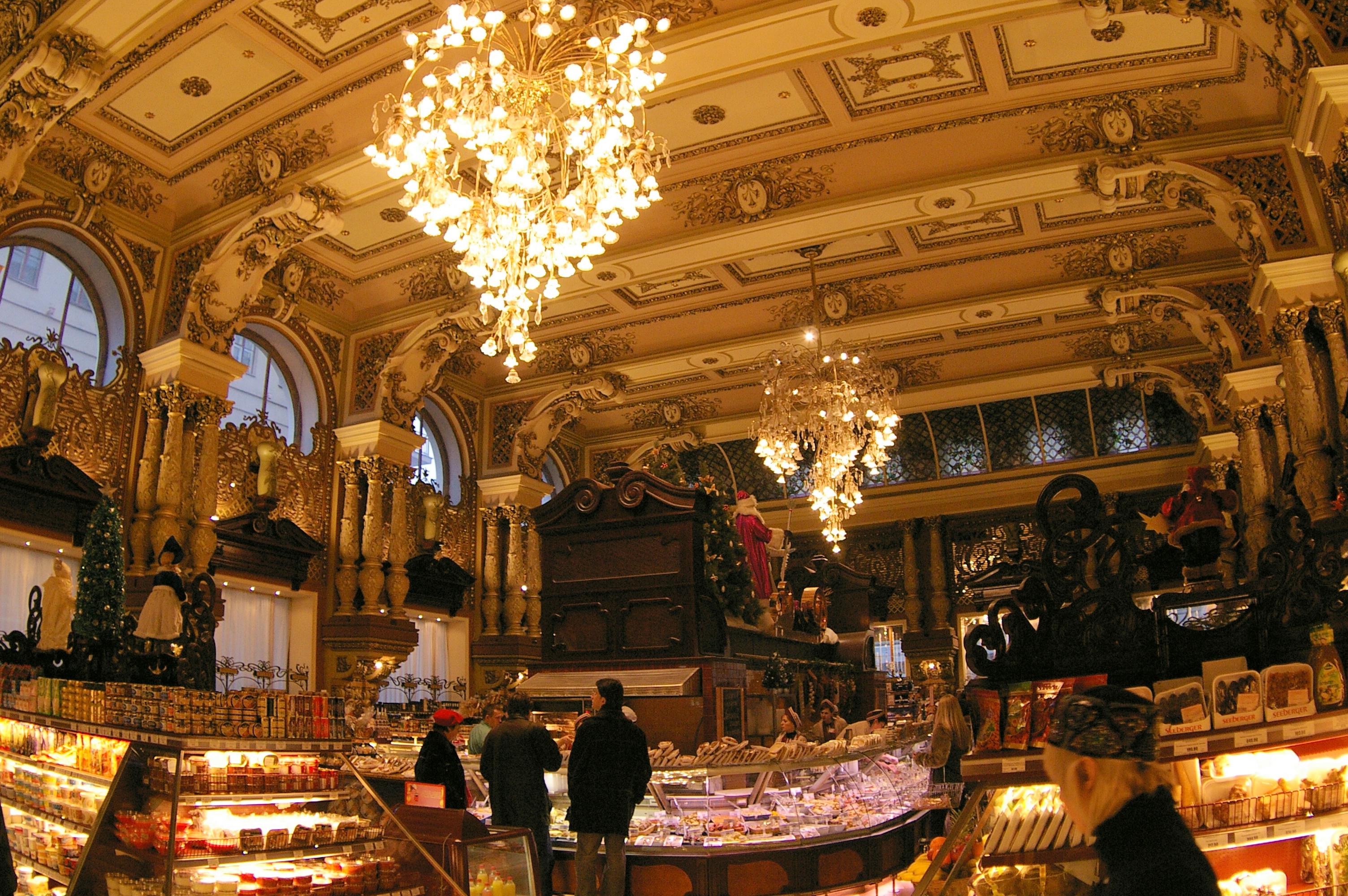 Eliseev supermarket, Moscow